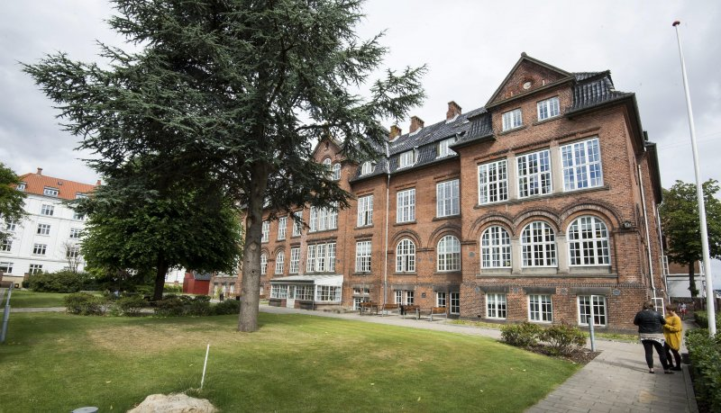 Sankt Joseph-komplekset i 2011 set fra den gamle have